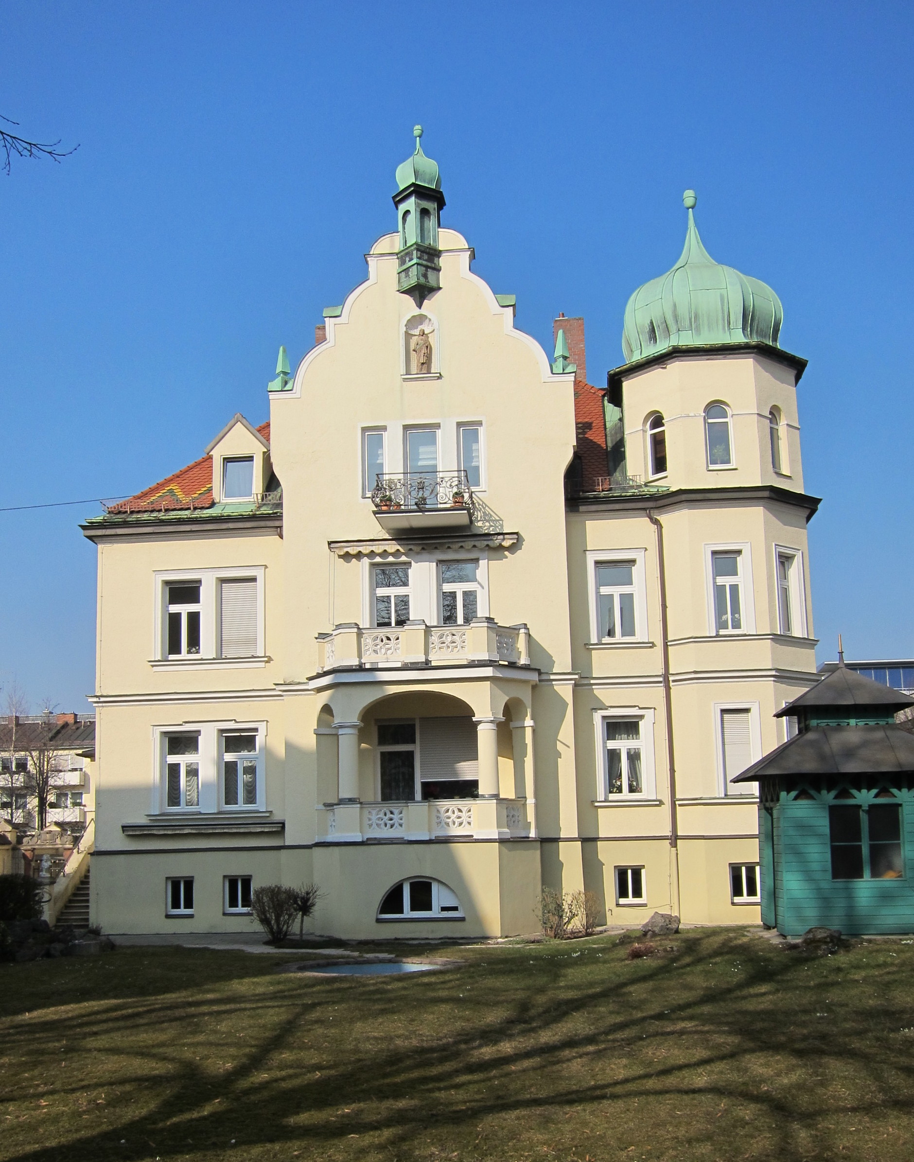 Berg-am-Laim-Straße 81; "Grundler"-Villa, Malerische Villa, deutsche Renaissance, um 1900; Vorgarten mit Vorgartenzaun